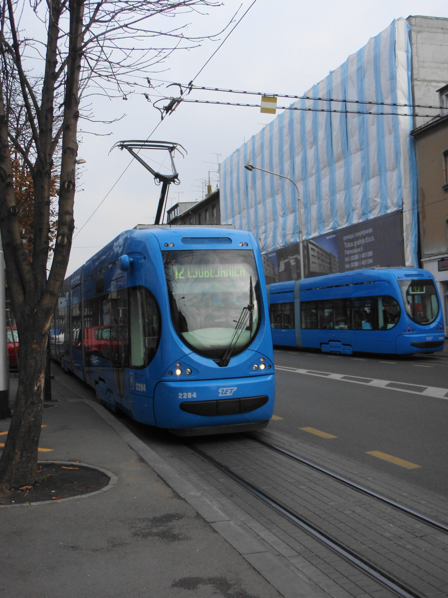 Zagrebački tramvaj.